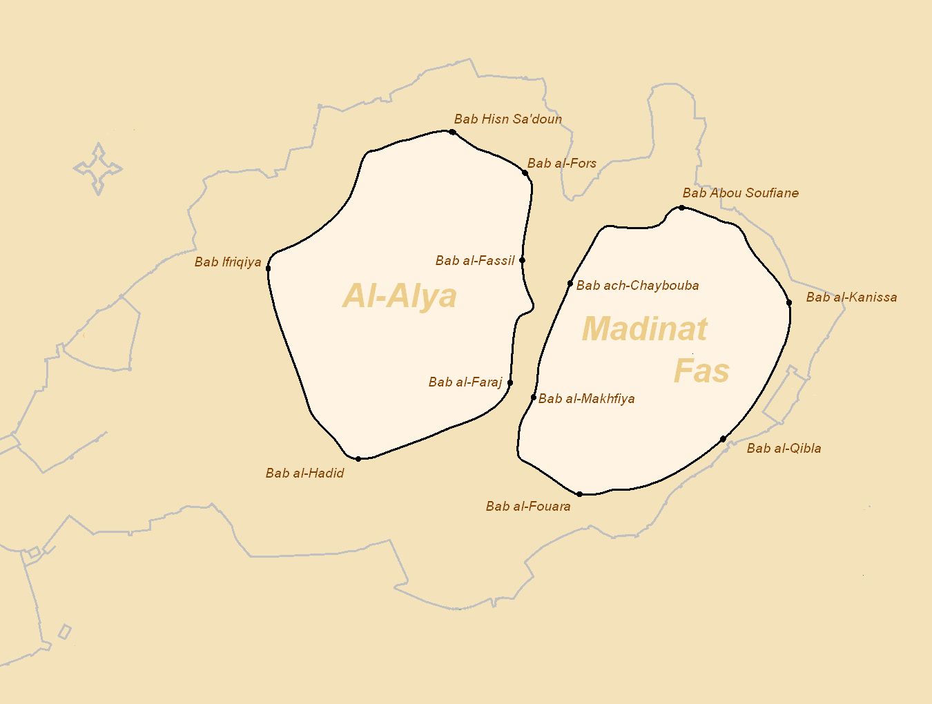 Murailles primitives de Fès (ère idrisside et zénète, Xe siècle)